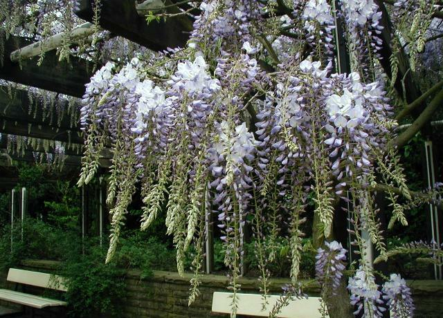 Wisteria sinensis